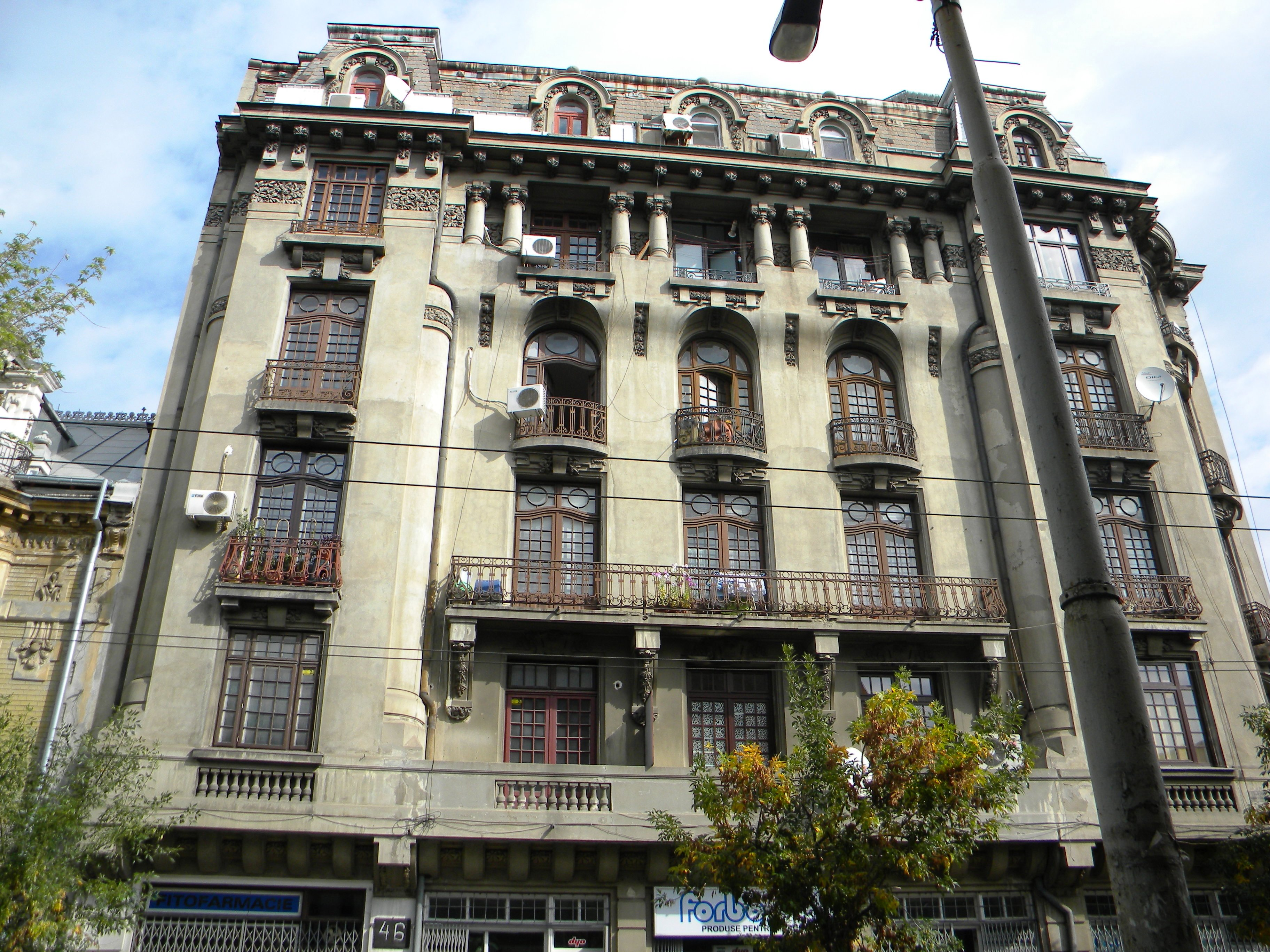 Bucuresti, Romania, Casa pe Calea Grivitei nr. 46, sect 1 (Casa unde a locuit Zoe Dumitrescu Busulenga)